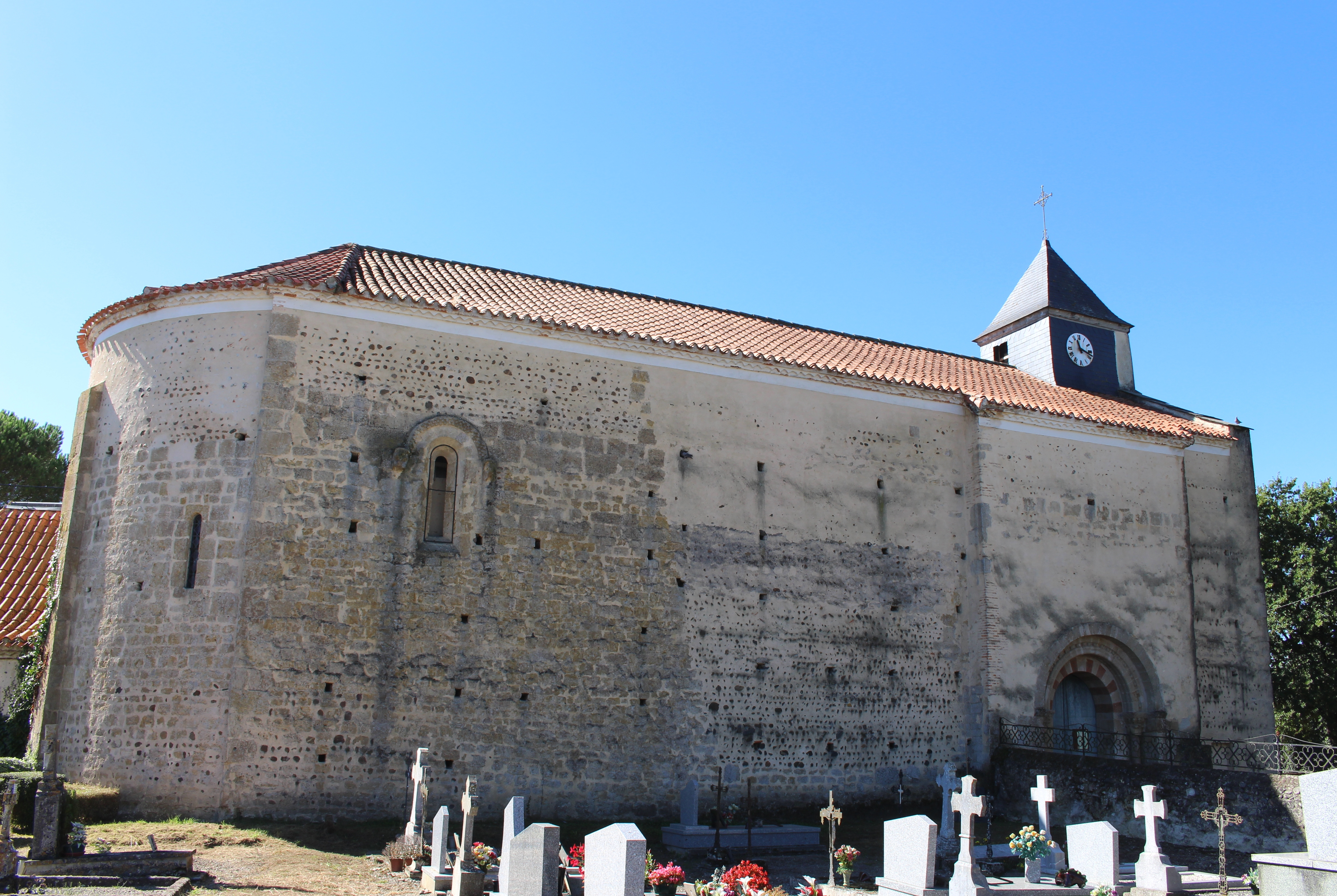 Église Saint-Martin de Caussade-Rivière (Hautes-Pyrénées)